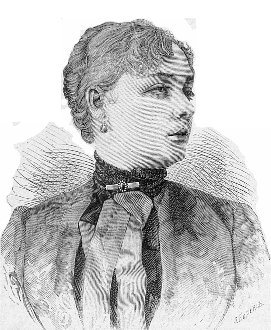 Горева Елизавета Николаевна, русская драматическая актриса